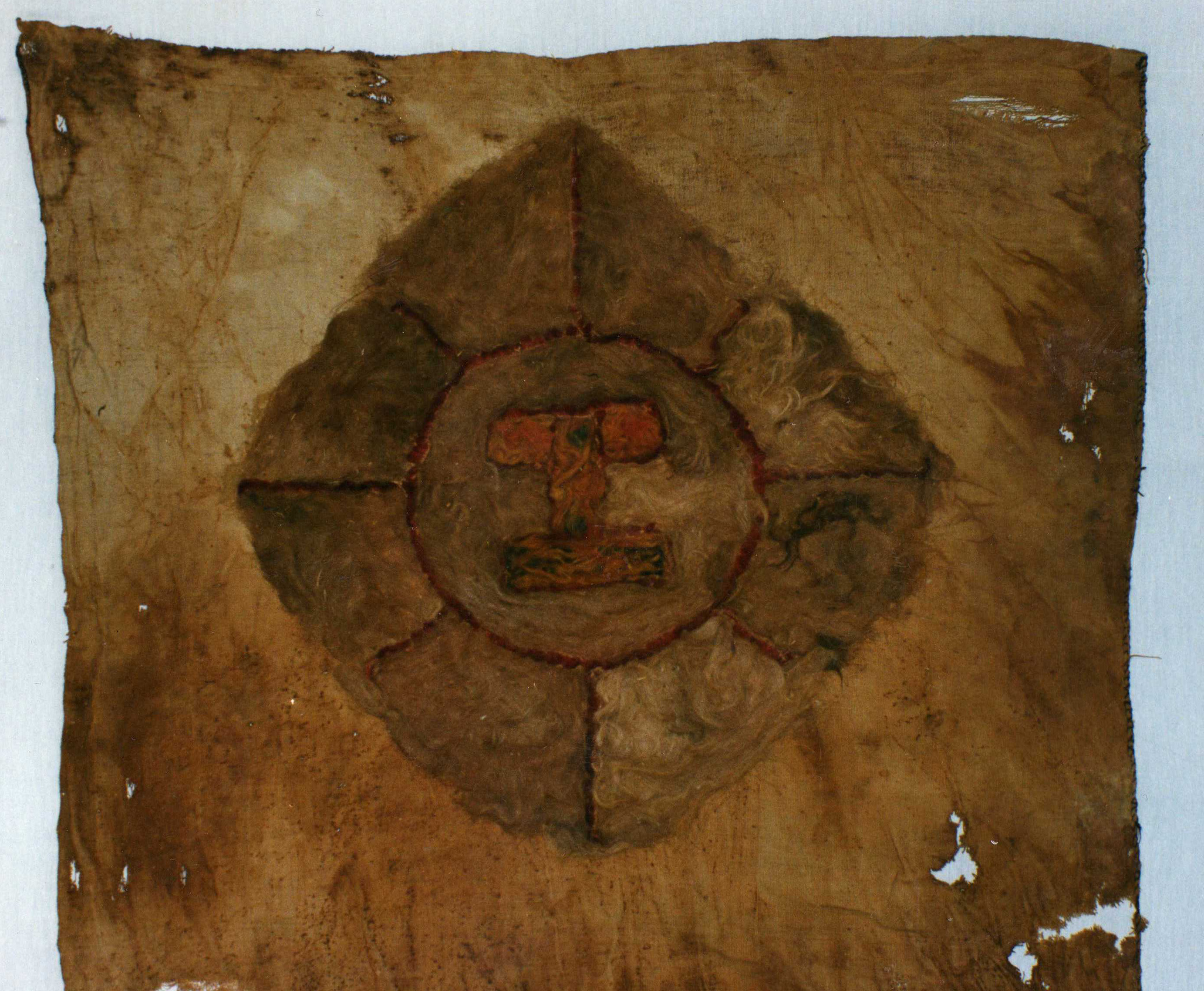 textil perteneciente al estilo Wari-valle de Majes. 83 cm alto, 80 ancho